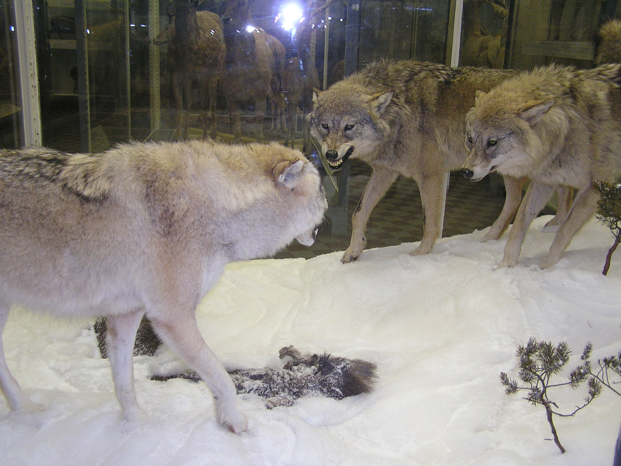 Зоологический музей в Санкт-Петербурге. Волк